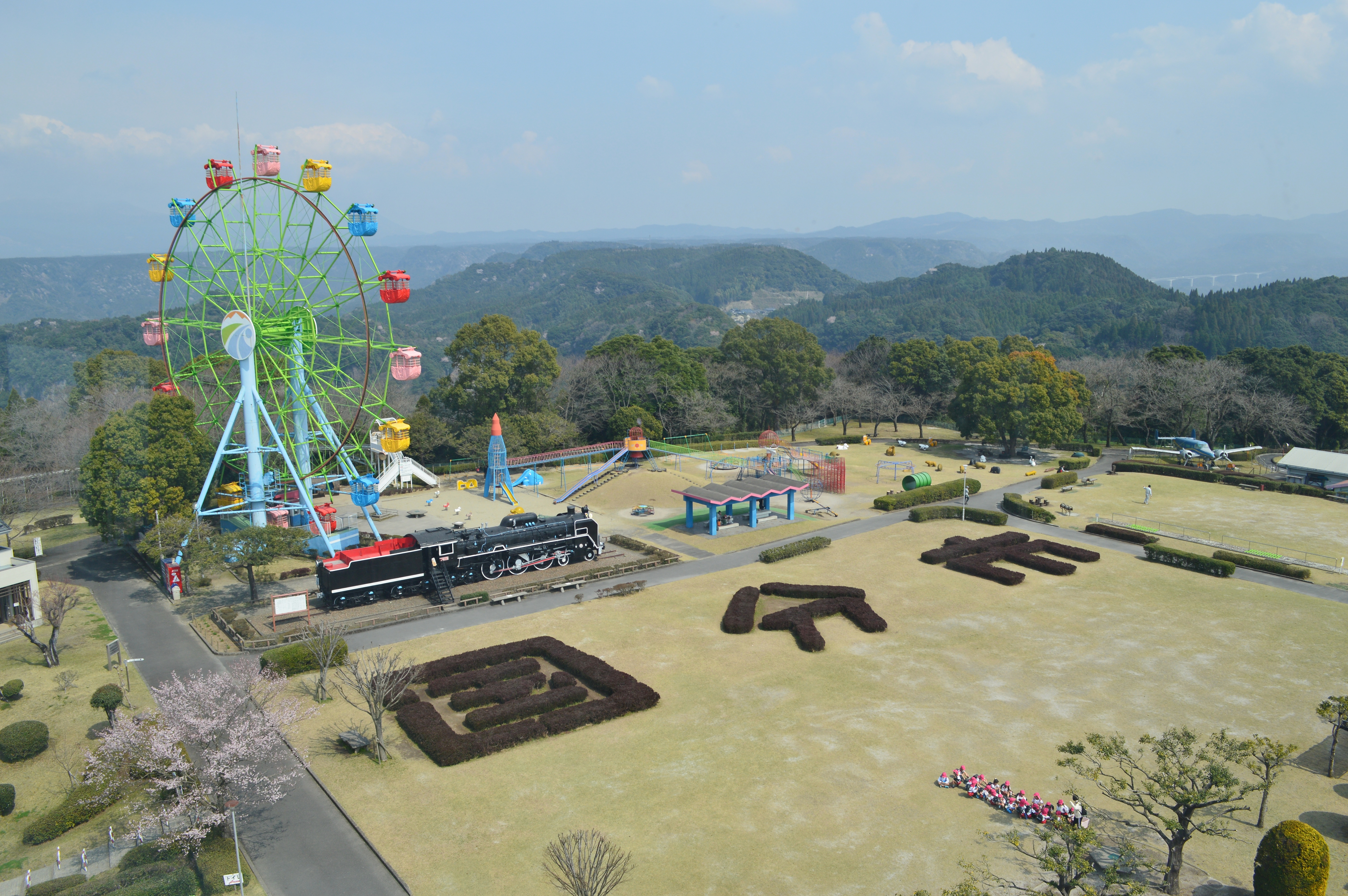 城山公園 (霧島市) 俯瞰全景